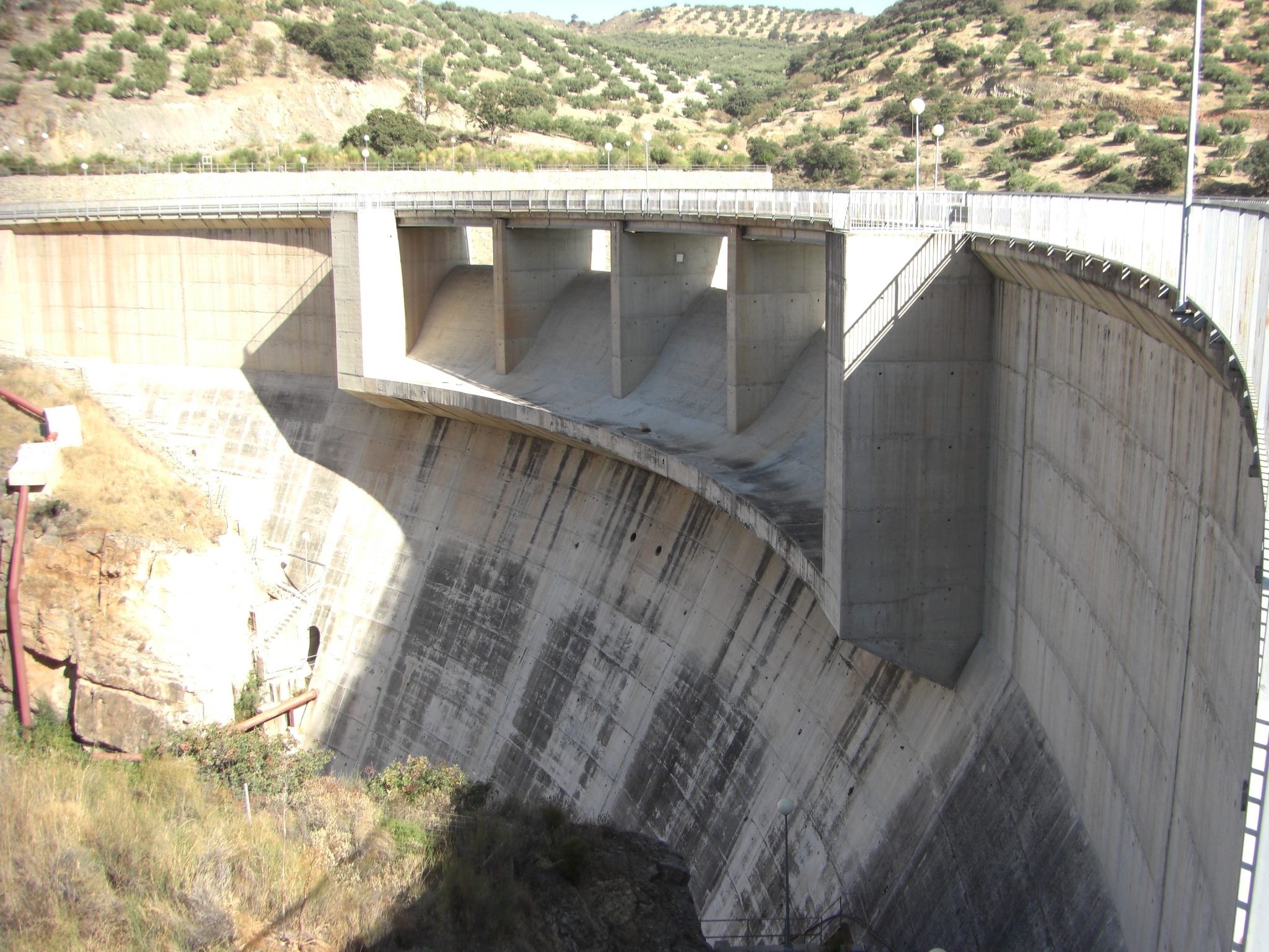 Vista de la presa del embalse del Víboras.